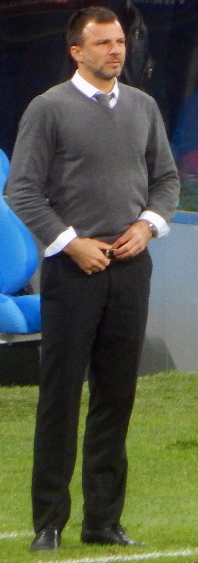 Энтони Хадсон в матче против сборной Мексики